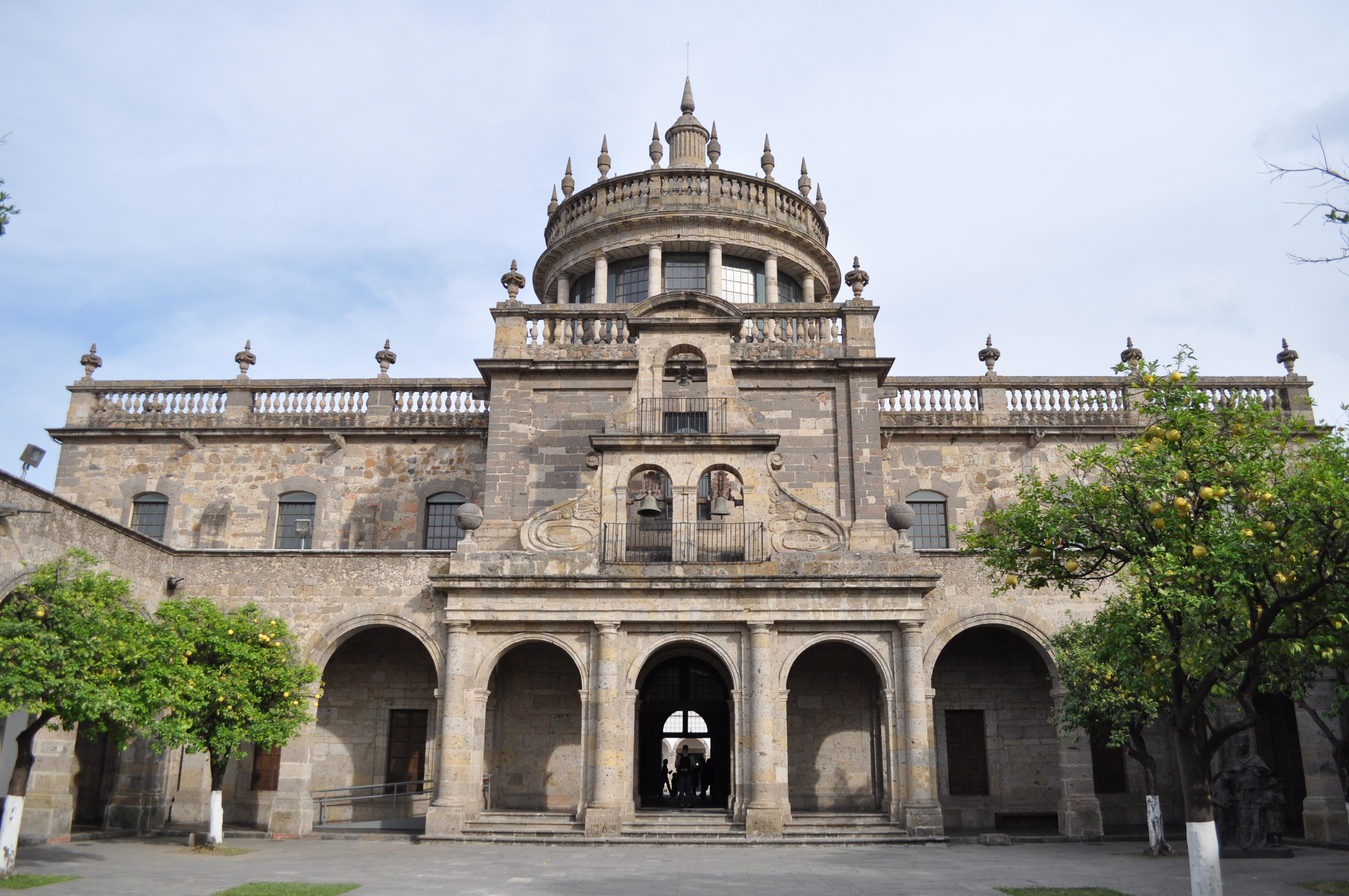 Este edificio se encuentra en la ciudad de guadalajara fue fundado,financiado y administrado por el obispo Juan Ruiz de Cabañas.